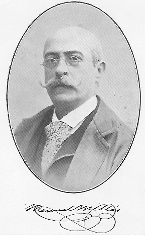 retrato y firma